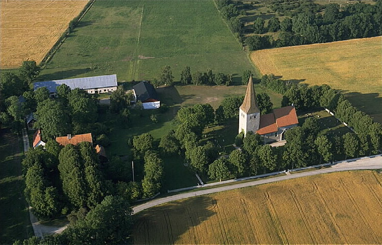 Motiv: Follingbo kyrka Nyckelord: Flygbilder, Riksintressen Kategori: KyrkomiljöFollingbo kyrka